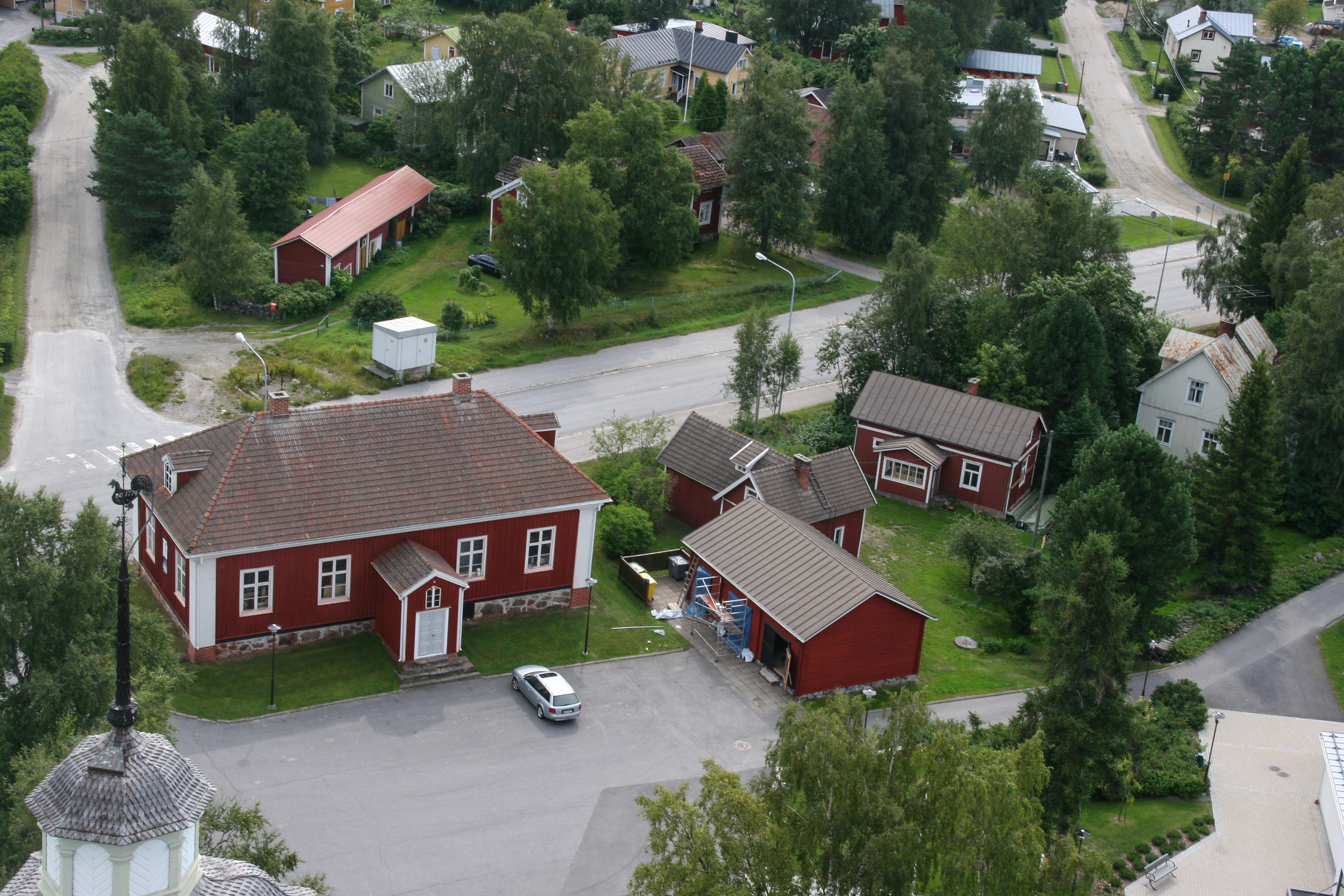 Pedersören kirkko ja Kirkkoranta; rakennettu kulttuuriympäristö Pietarsaaressa. Kuvattu korkon tornista.